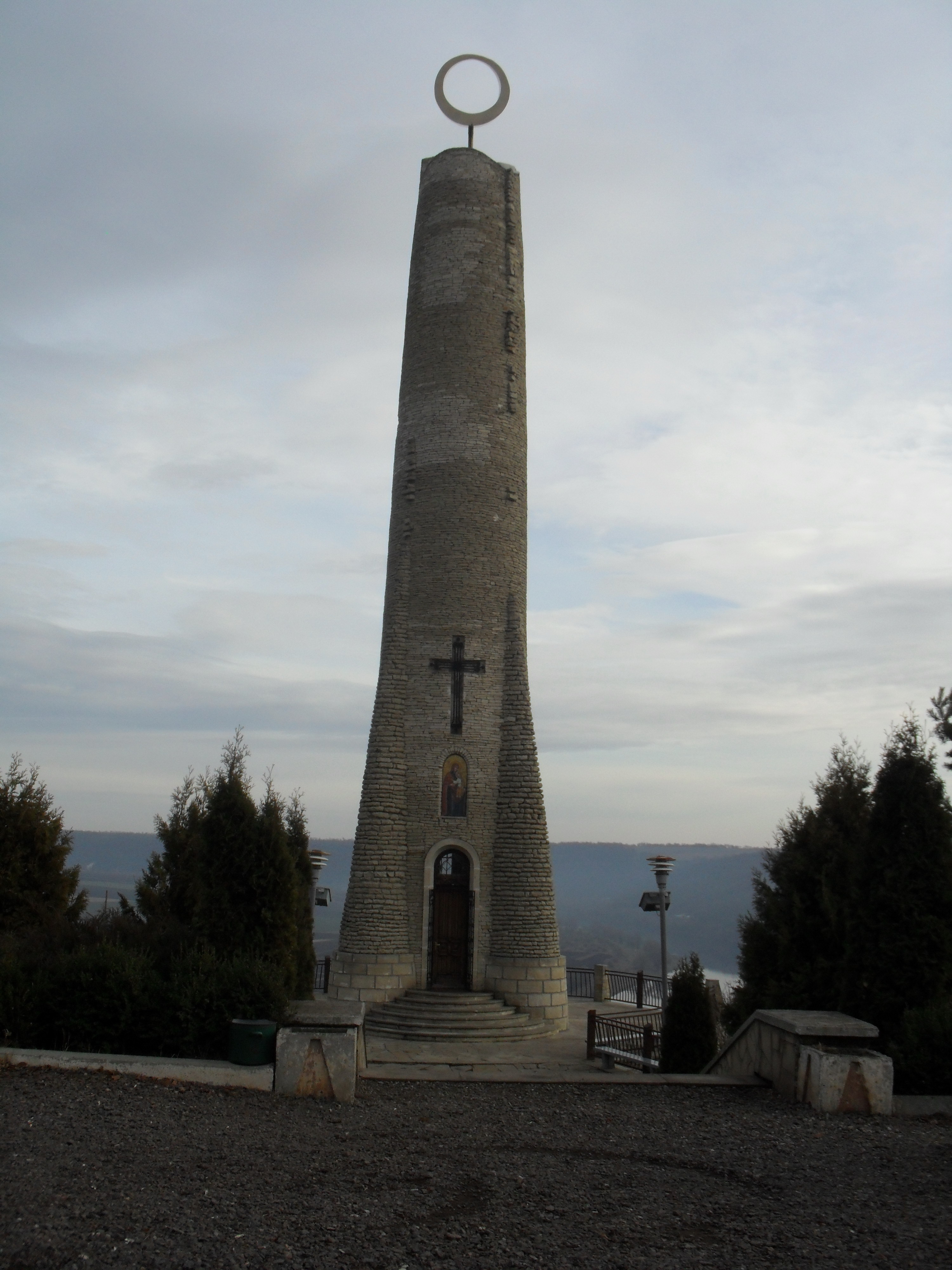 м. Сороки. Свіча Подяки.